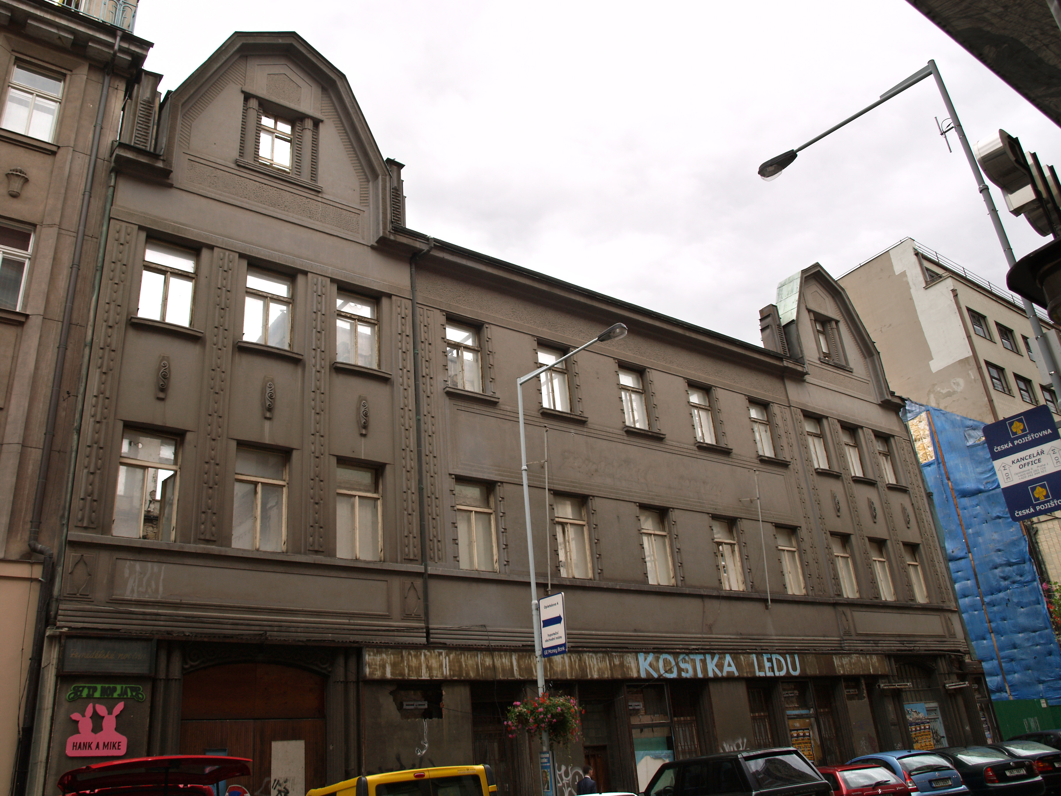 Rekonstrukce (nebo demolice?) domu Opletalova 920/3; v 17. století dům nazýván U Turků, v 19. století dům klasicistní, od roku 1911 pozdně secesní budova (přestavba podle projektu inženýra Václava Havla a stavitele J. Čámského – info zde), ve které byla Pražská akciová tiskárna, redakce Národních listů a před rokem 1990 Zemědělské noviny; roku 2003 Ministerstvo kultury ČR prohlásilo objekt za kulturní památku v definovaném a omezeném rozsahu, je zájem jej přebudovat na komerčně administrativní centrum… Aktualizace 2013: Dům byl zdemolován v říjnu 2013 poté, co jeho majitel navzdory památkové ochraně jeho velkou část v roce 2008 zboural.